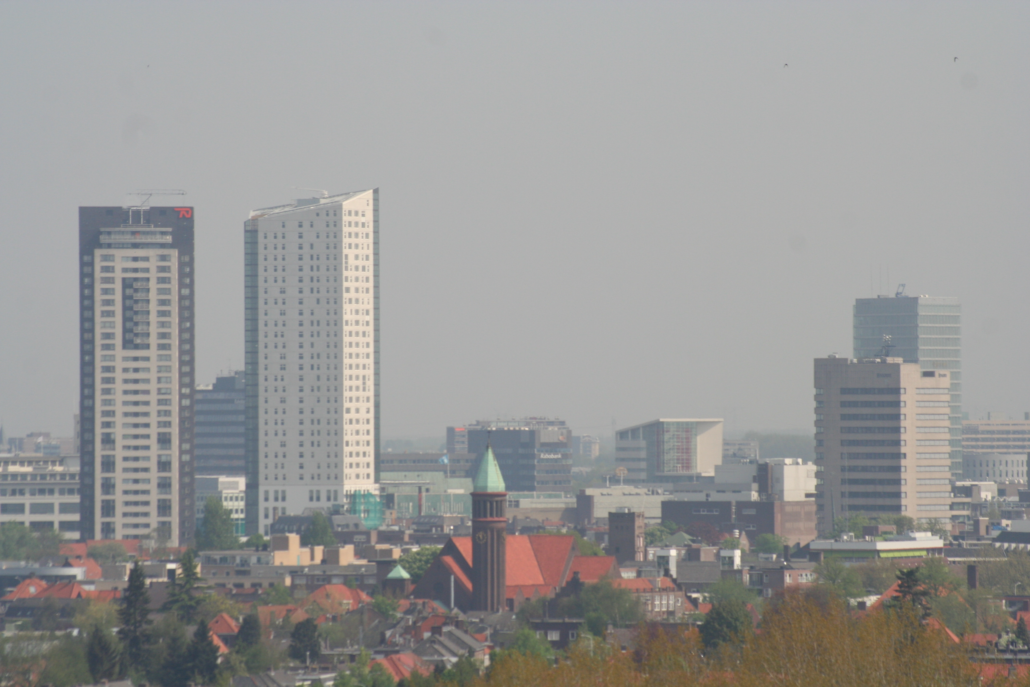 Hoogbouw Eindhoven